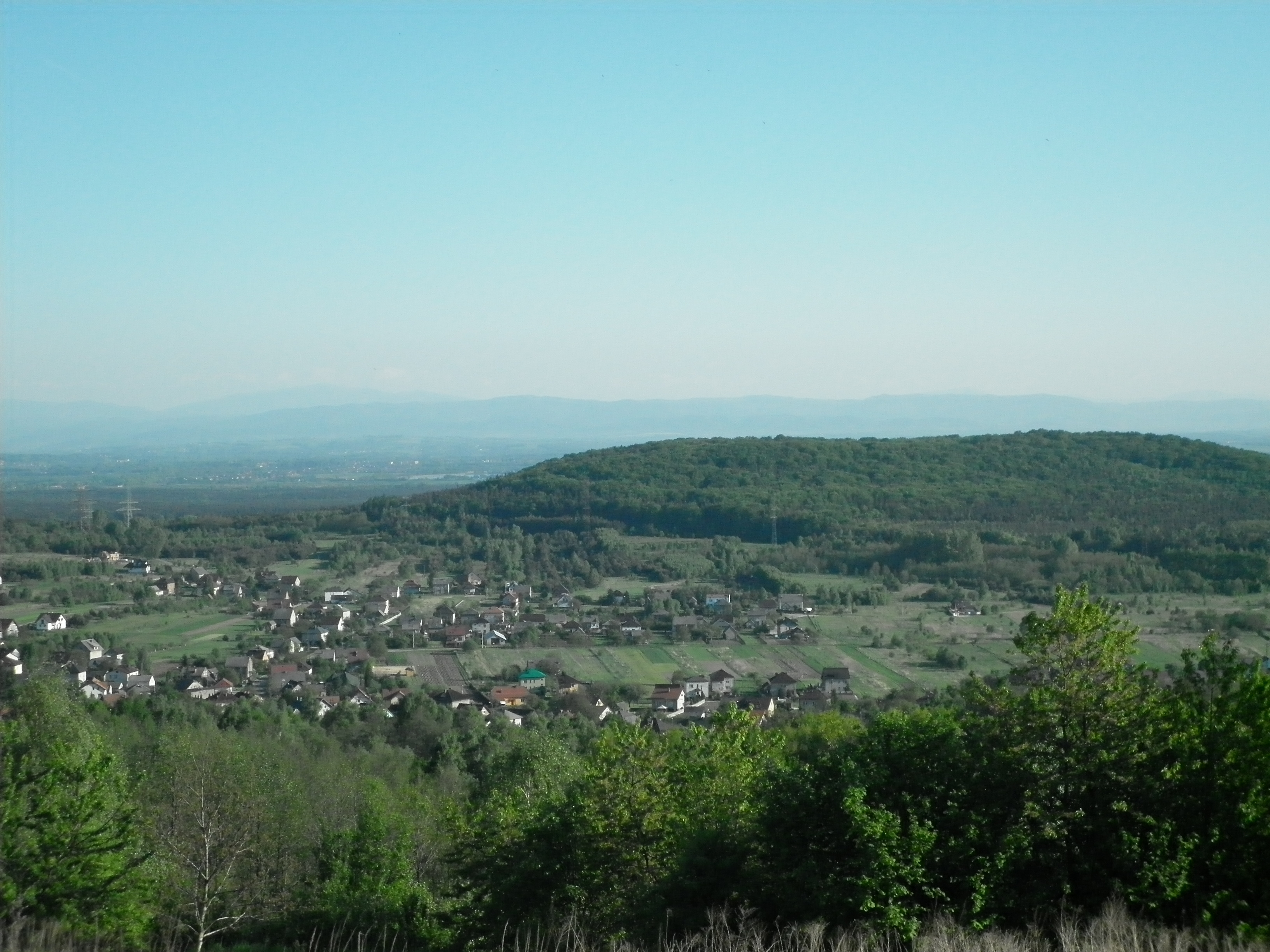 Widok na Zagórze z "gorów"